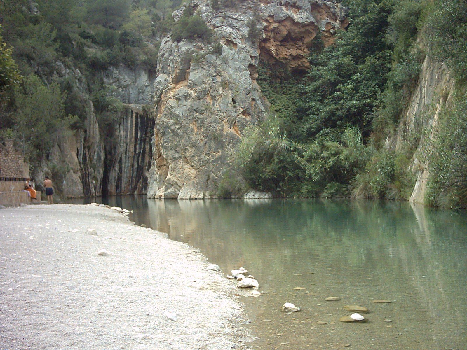 La Fuente de los Baños de Montanejos, es un manantial natural del río Mijares, con un caudal aproximado de unos 6.000 litros por minuto. Su agua fue declarada de utilidad pública por la Real Orden del 13 de octubre de 1863. Por su temperatura constante de 25ºC tiene efectos hipo termales y hace placentero el baño durante todo el año. Además, cuenta con propiedades hidrogeoquímicas y biológicas beneficiosas para la salud. Por su composición química (700 mg/l sulfatado–magnésicas bicarbonatado mixtas) es considerada como oligometálica de mediana mineralización. La fisiografía del cauce en esta zona ha permitido la formación de piscinas naturales que suponen una excelente zona de descanso, que se encuentra acondicionada con merenderos y juegos infantiles.